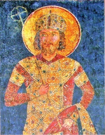 цар Константин Тих Асен, цар на България